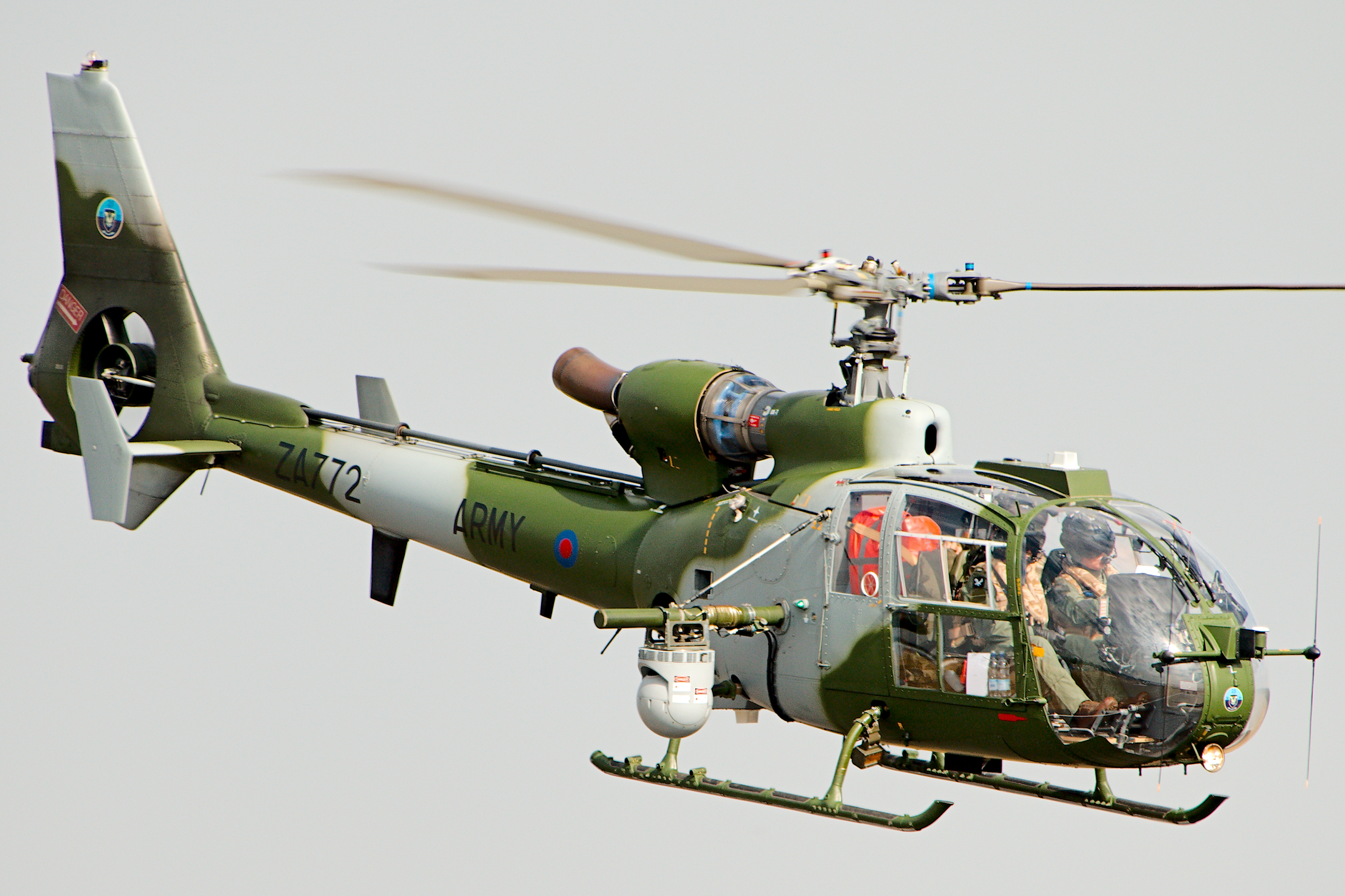 Gazelle - RIAT 2018